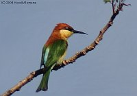 Chestnut Headed Beeeater Merops leschenaulti